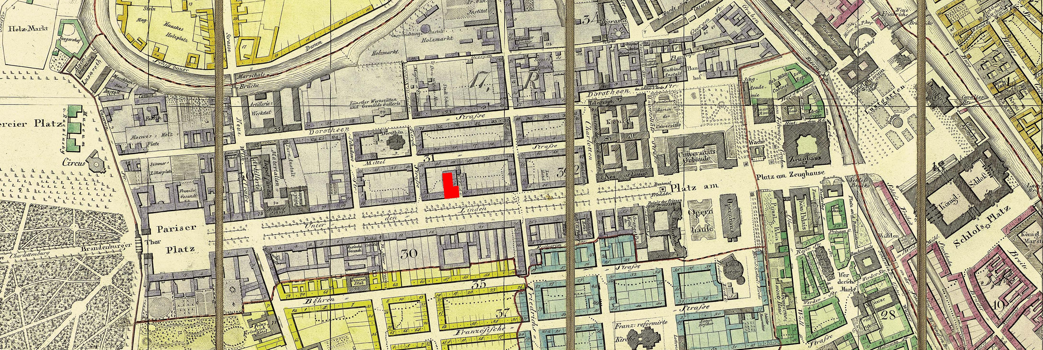 Lageplan des (ehemaligen)British Hotel in Berlin, Unter den Linden Nr. 56.